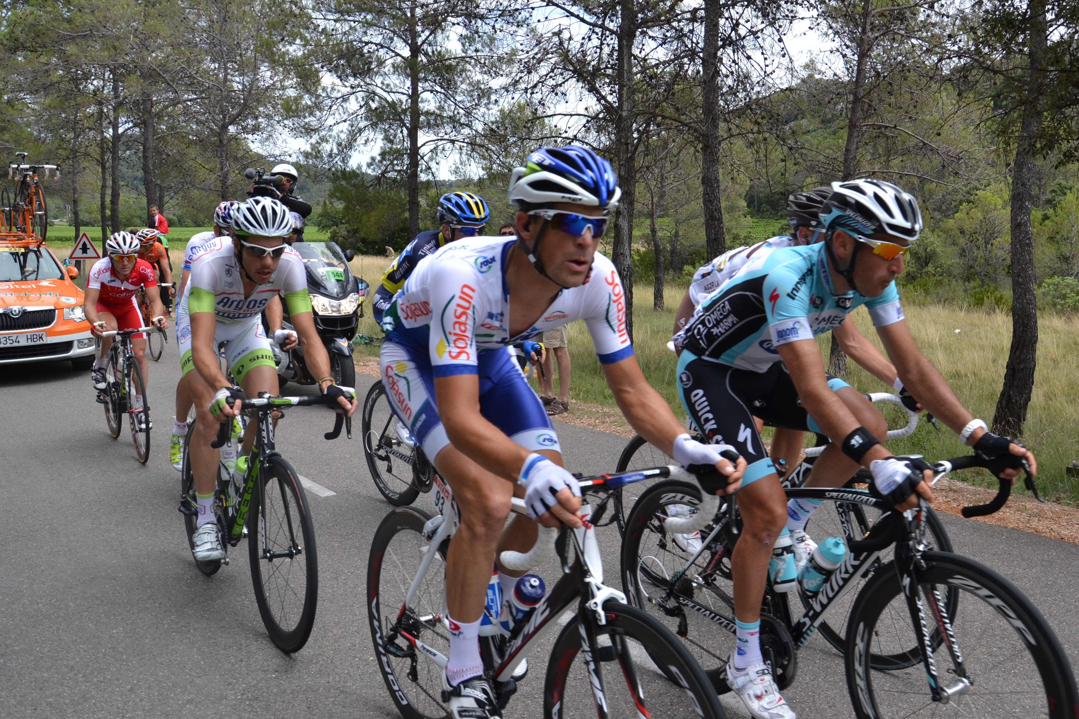 Passage des 8 échappés au Pic St-Loup sur la D1 (km 120). Pablo Urtasun (Euskaltel-Euskadi), Samuel Dumoulin (Cofidis), Matthieu Ladagnous (FDJ-BigMat), Michael Morkov (Saxo Bank-Tinkoff Bank), Roy Curvers (Argos-Shimano), Jimmy Engoulvent (Saur-Sojasun), Maxime Bouet (AG2R La Mondiale) et Jérôme Pineau (Omega Pharma-Quick Step).